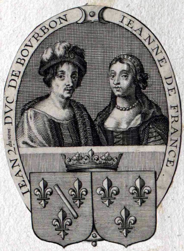 Jean II, duc de Bourbon et sa femme Jeanne de France